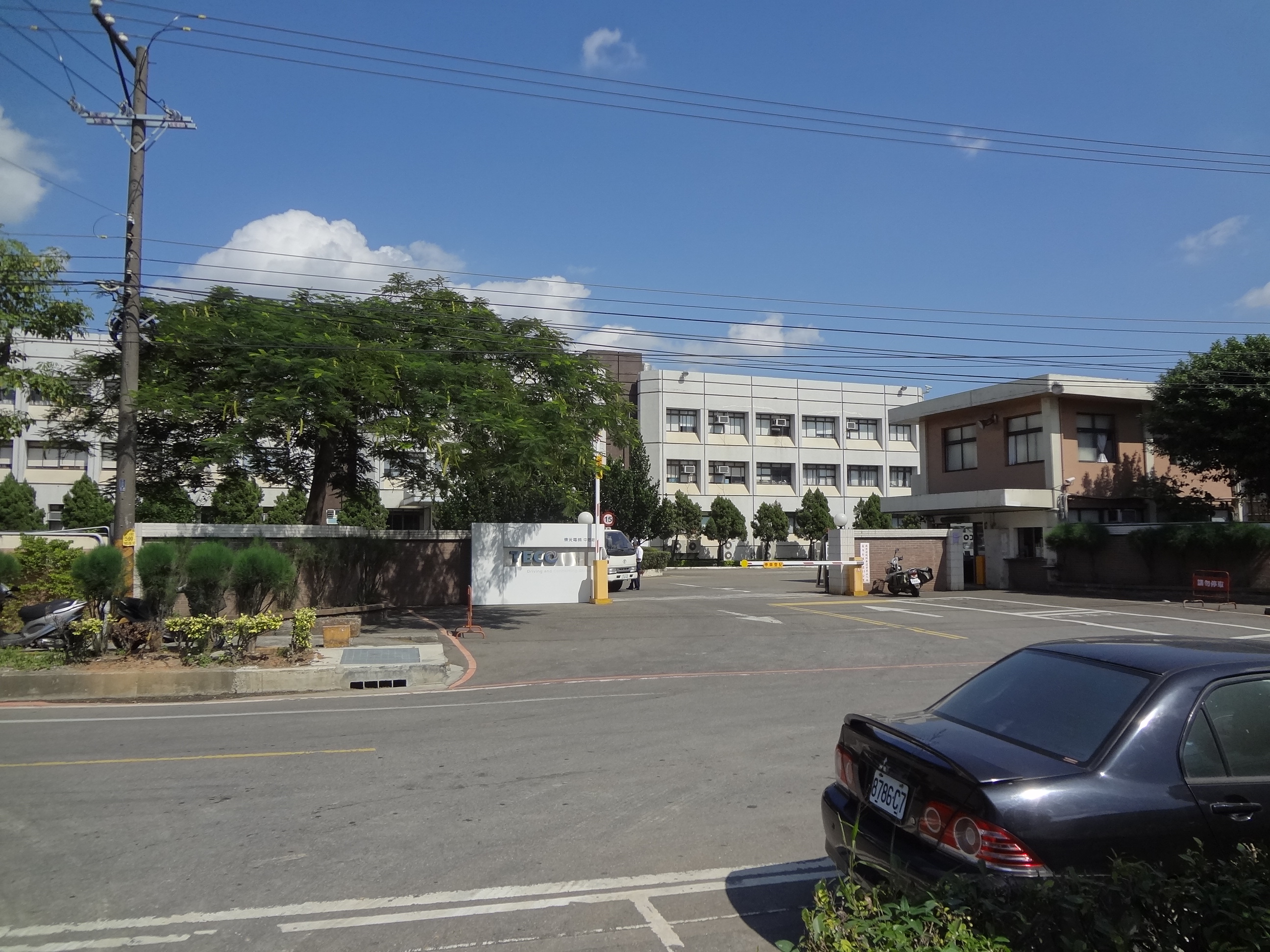 東元電機中壢廠，位於臺灣桃園縣中壢市安東路11號。